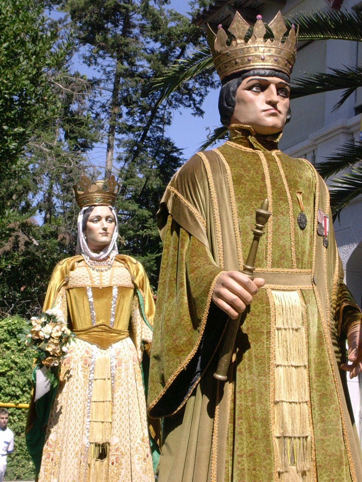 En Ferran i la Isabel, els Gegants d'Igualada (construïts el 1943)